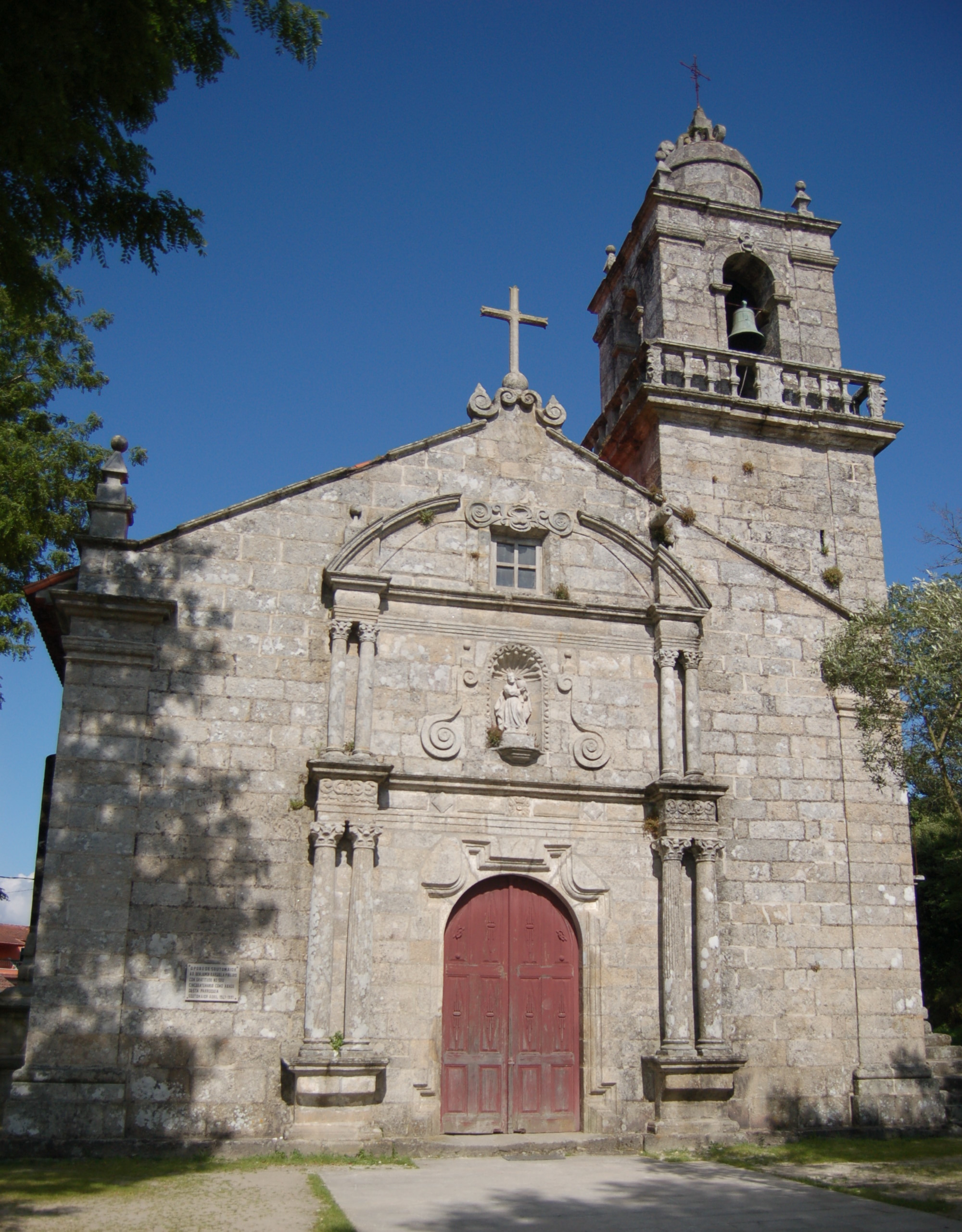 Igrexa parroquial de San Salvador de Soutomaior (Soutomaior)